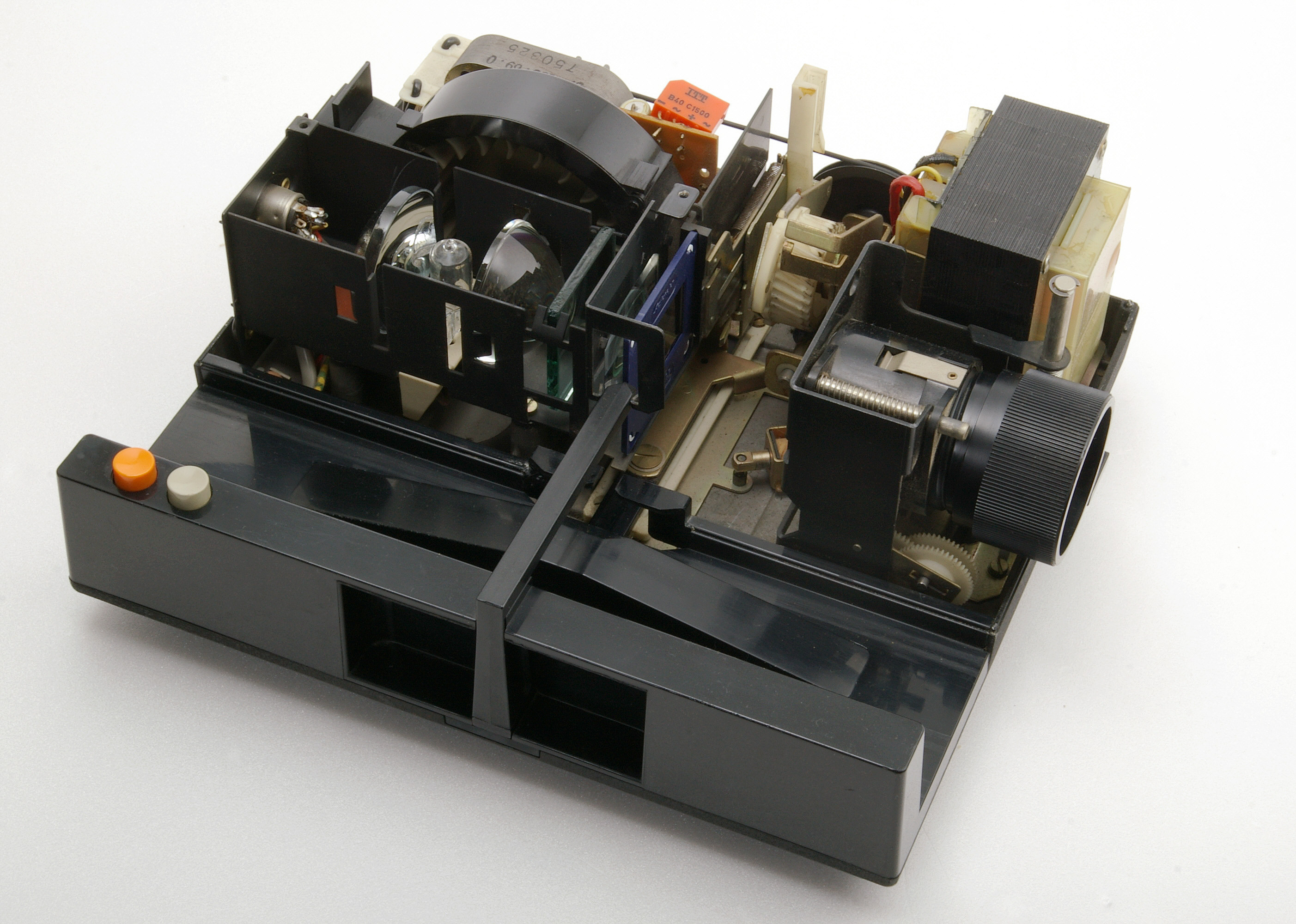 Typischer Kleinbild-Diaprojektor, geöffnet.